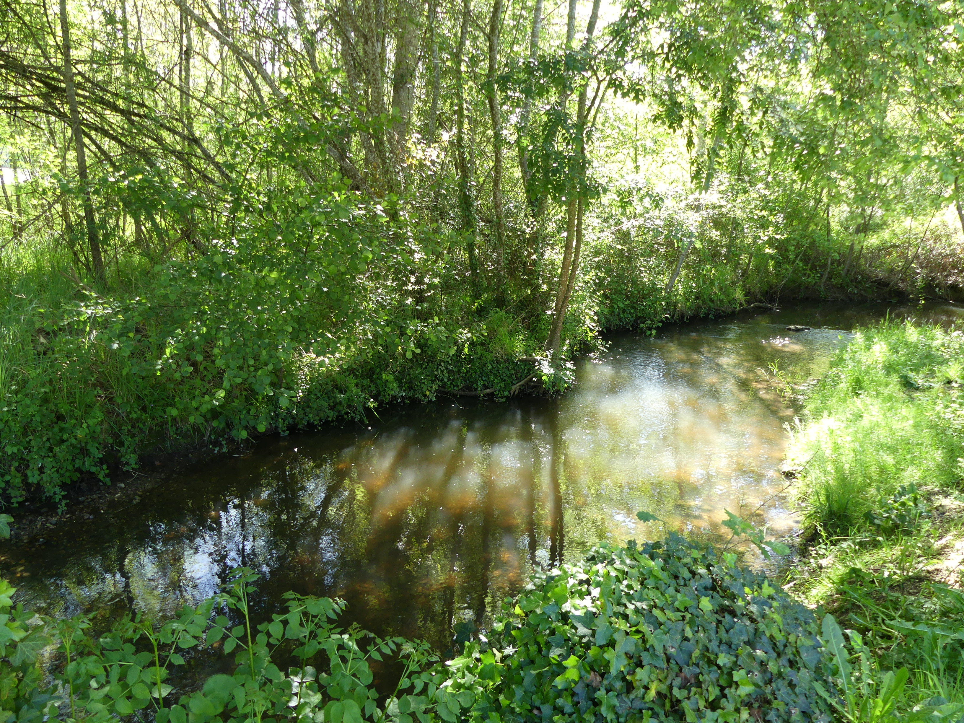 La Beauronne à Petit-Boissonnie en limites de Douzillac (au premier plan) et Beauronne (en rive opposée), Dordogne, France. Vue prise en direction de l'amont.